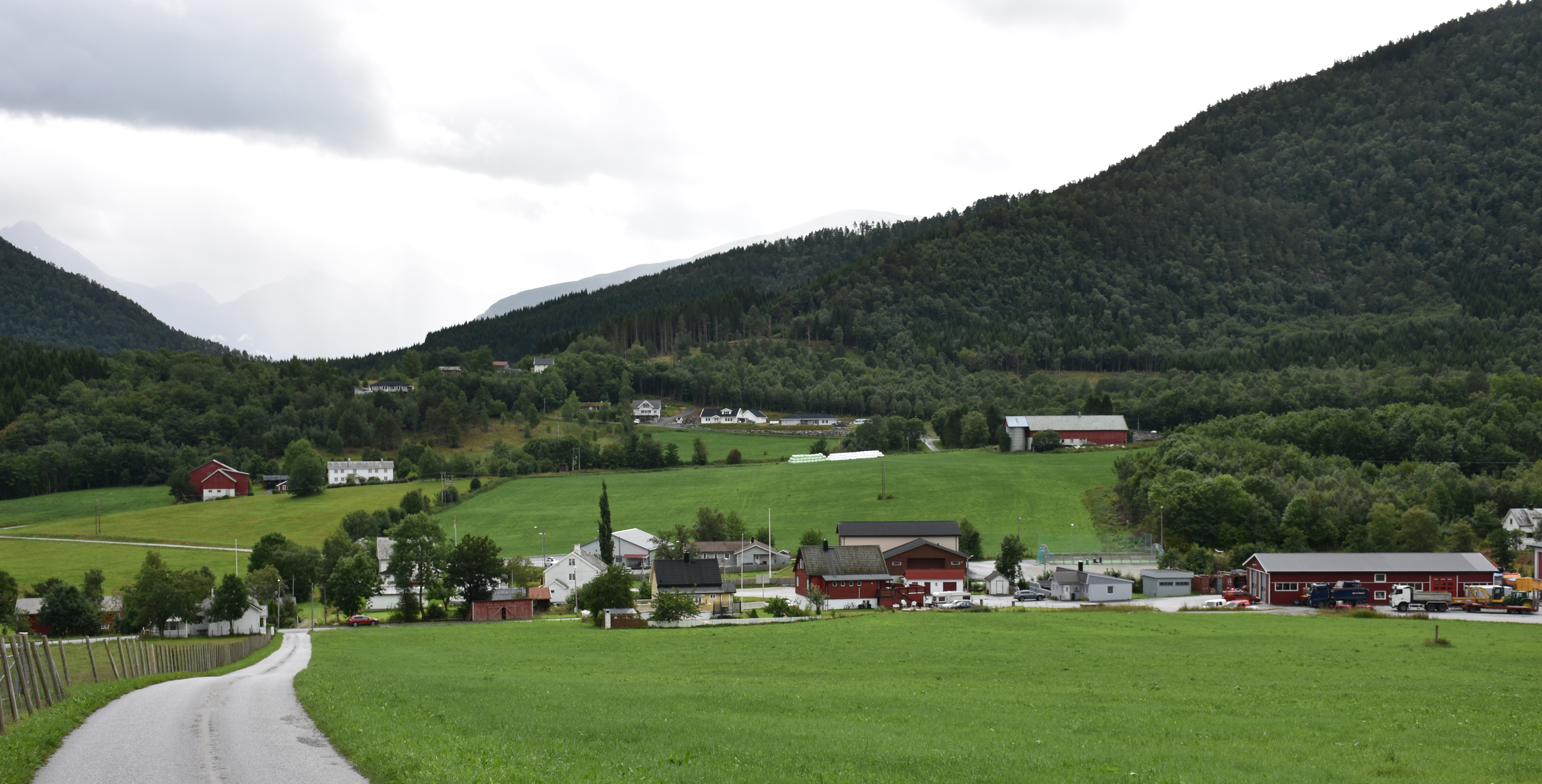 Eidsbygda i Rauma